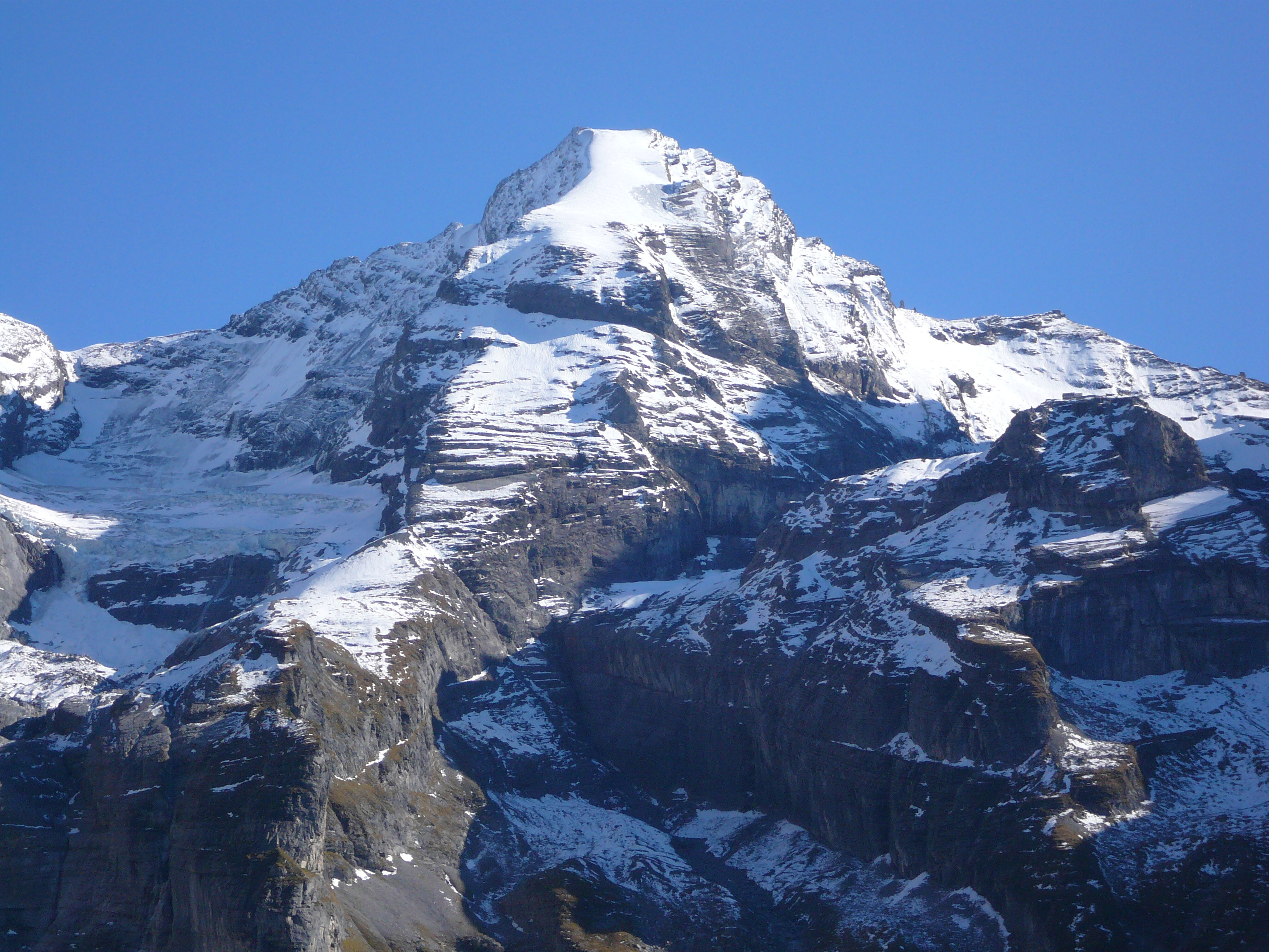 Fründenhorn [1] in Kandersteg vom Fussweg zum Oberbärgli aus gesehen [2]